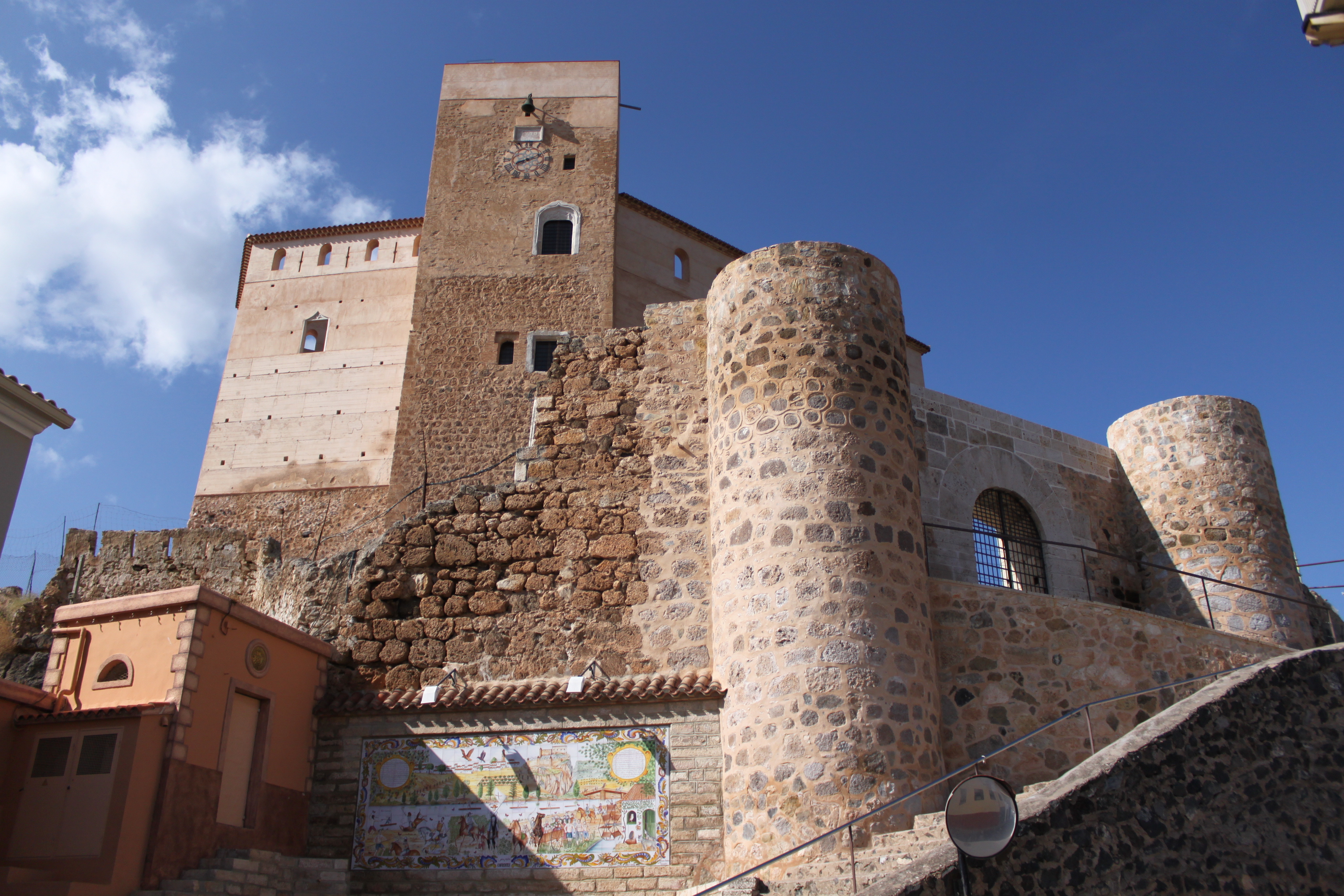 Castillo de Cofrentes, provincia de Valencia, Comunidad valenciana, España